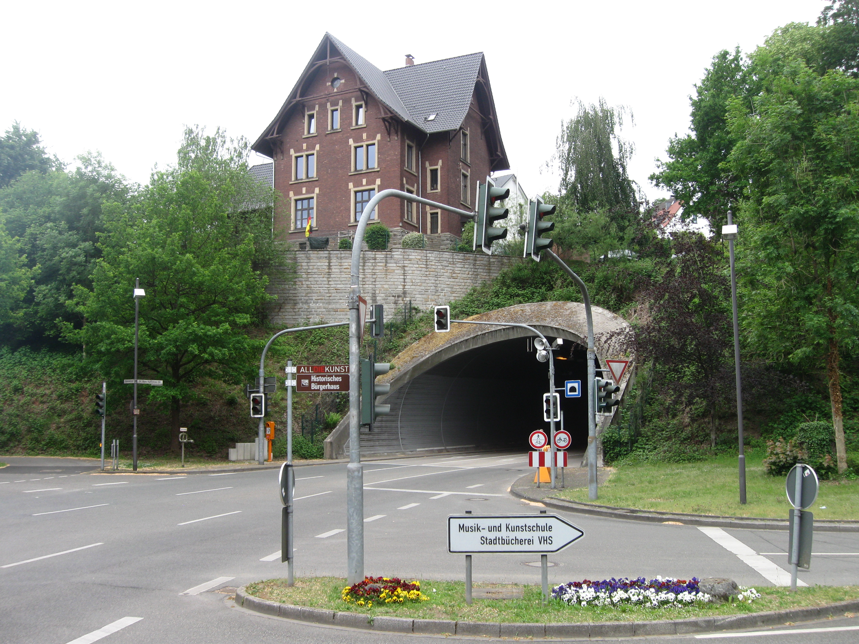 Tunnel Langenberg (Osttor)